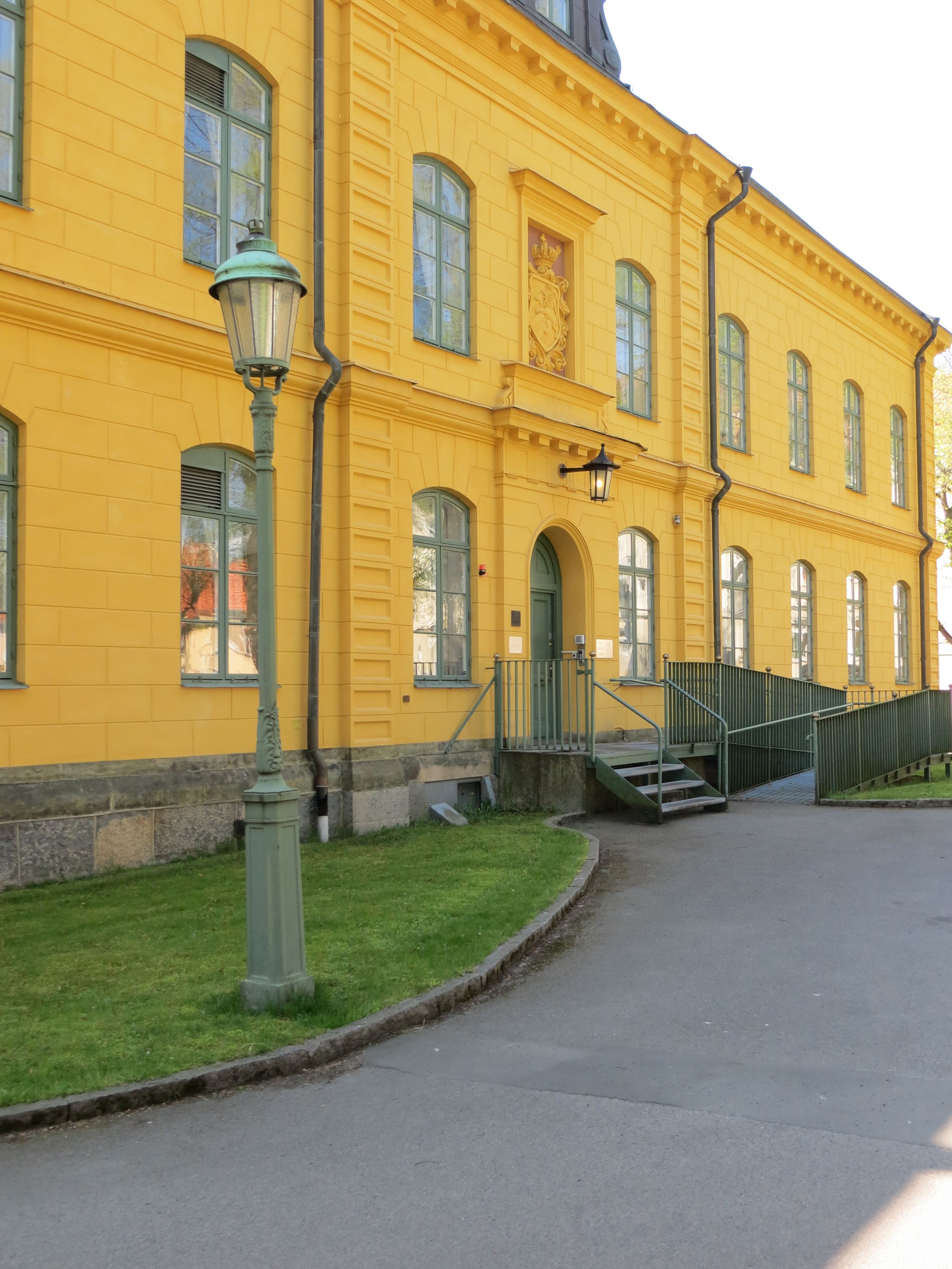 Ämbetsbyggnaden vid Göta hovrätt